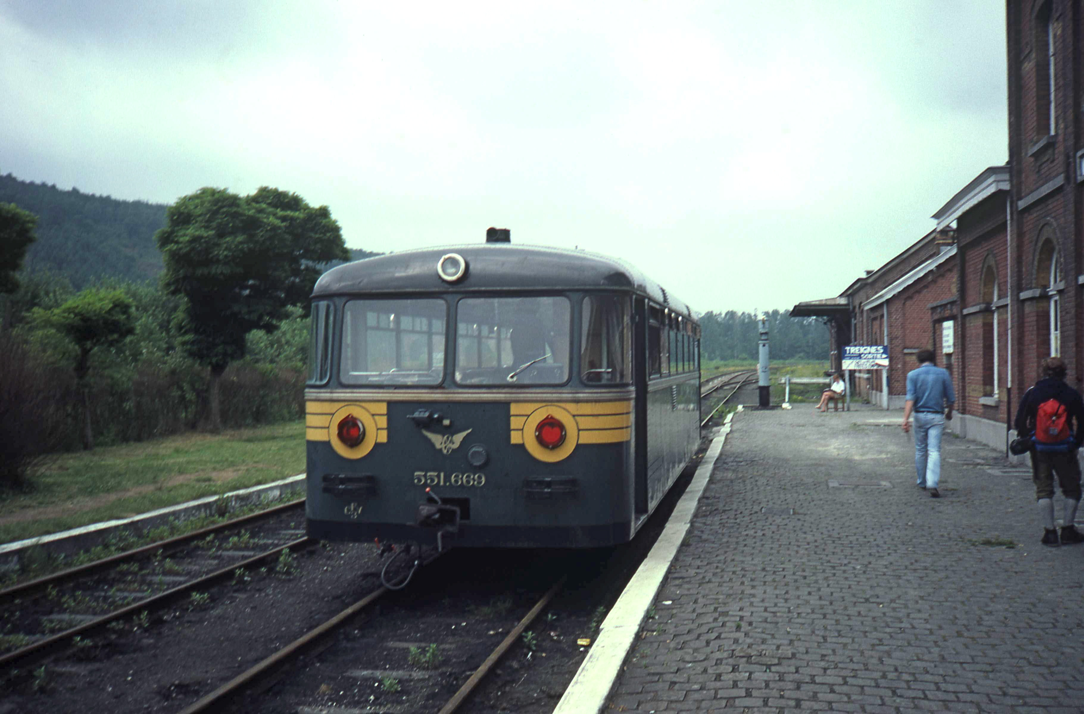 Autorail Schinenbus ex-DB repeint en livrée SNCB par le CFV3V. Cette livrée est totalement fantaisiste car ces autorails n'ont jamais roulés en Belgique.